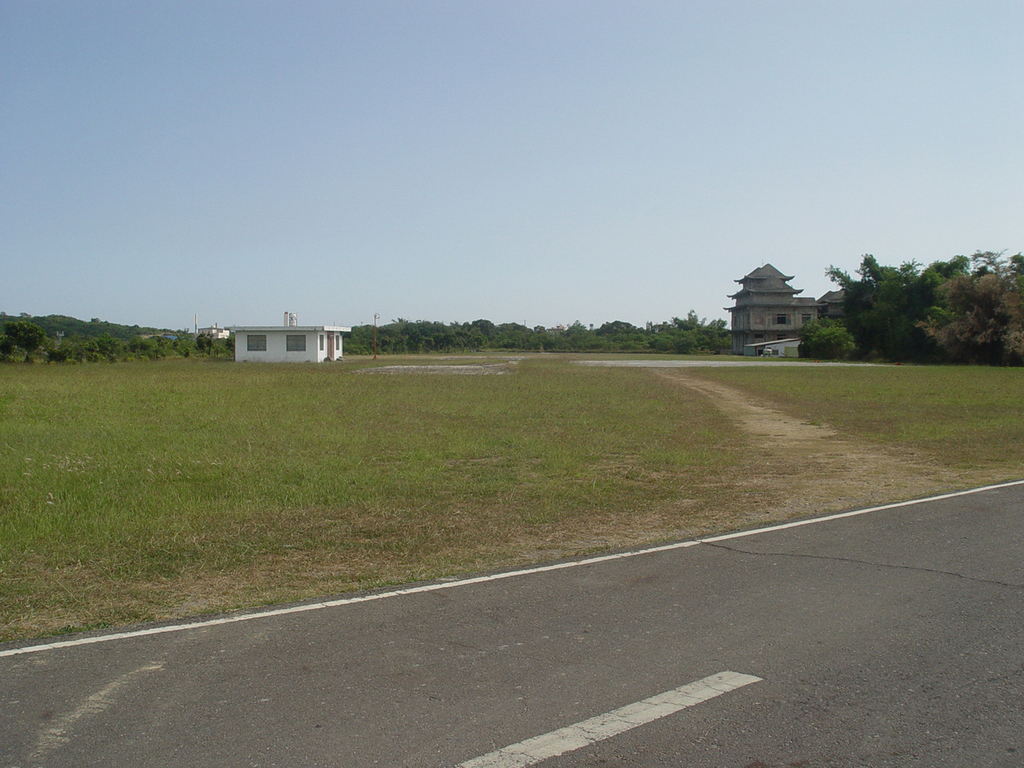 中文（台灣）: 屏東縣小琉球機場，目前僅供直昇機起降使用。